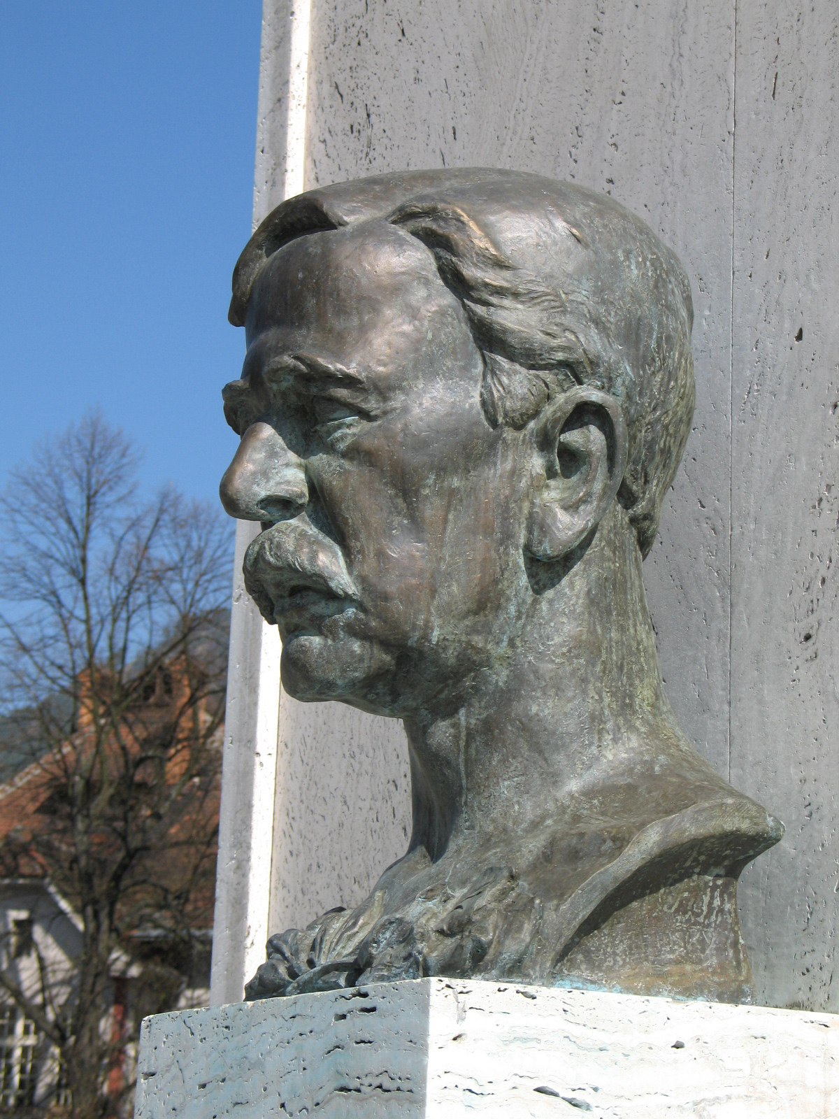 Bronzová busta Roberta Wiliama Setona-Watsona This medium shows the protected monument with the number 508-368/2 (other) in the Slovak Republic.